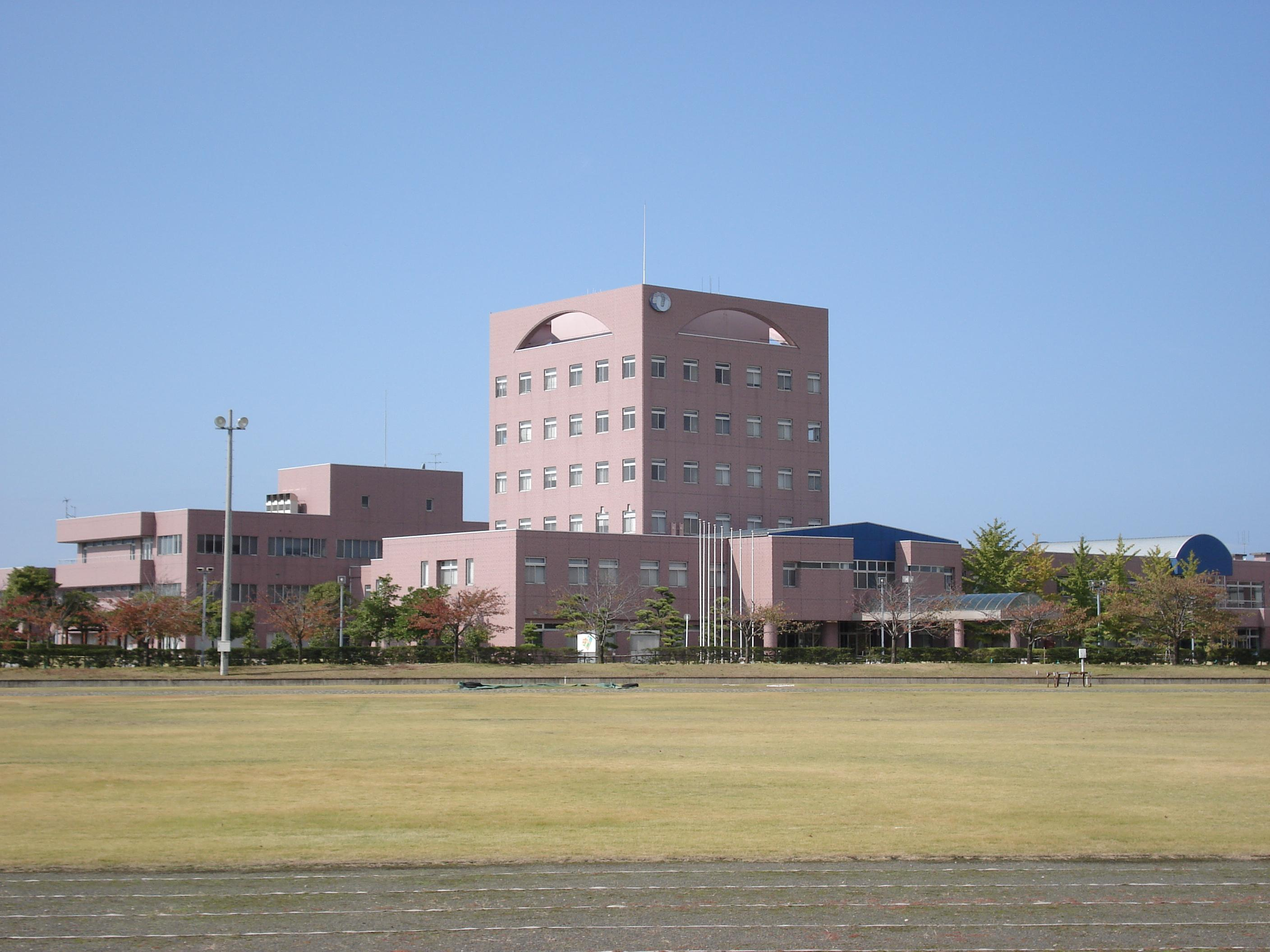 新潟国際情報大学。2007.10.28 投稿者本人により撮影。